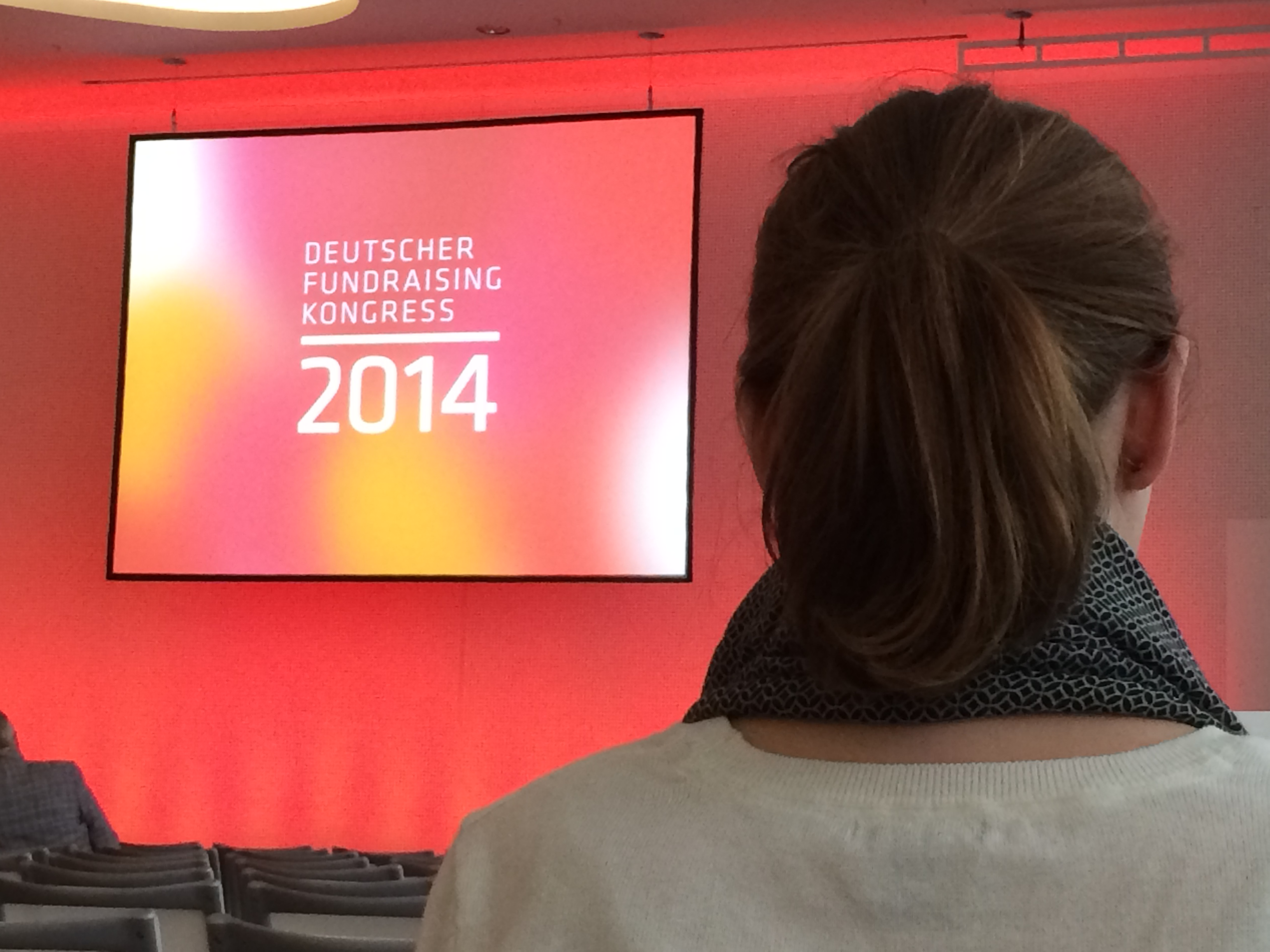 Auf dem Deutschen Fundraising Kongress 2014, einer Veranstaltung des Deutschen Fundraising Verbands.